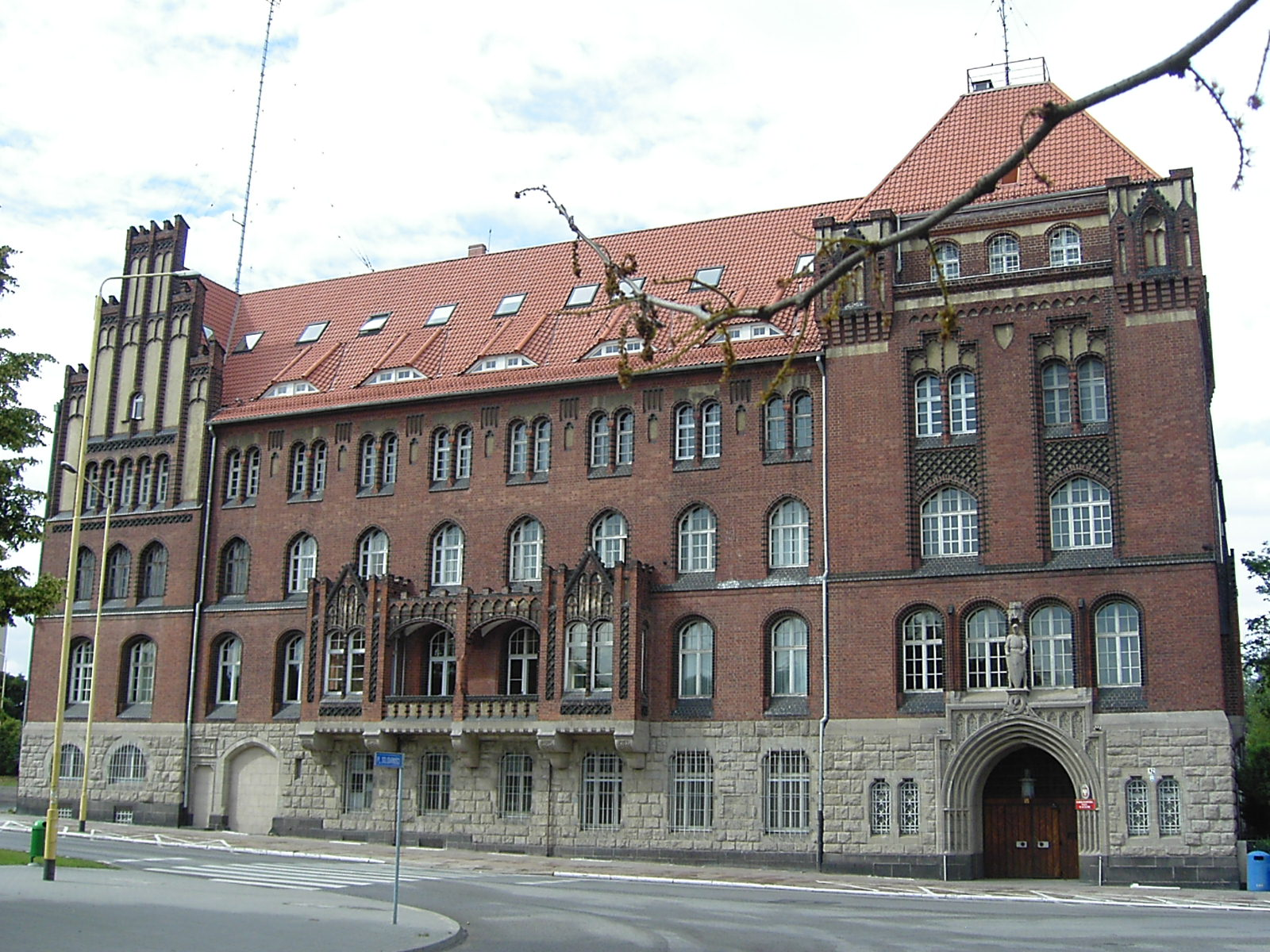 W tym budynku przy ulicy Małoposkiej w Szczecinie znajdował się Wojewódzki Urząd Bezpieczeństwa Publicznego